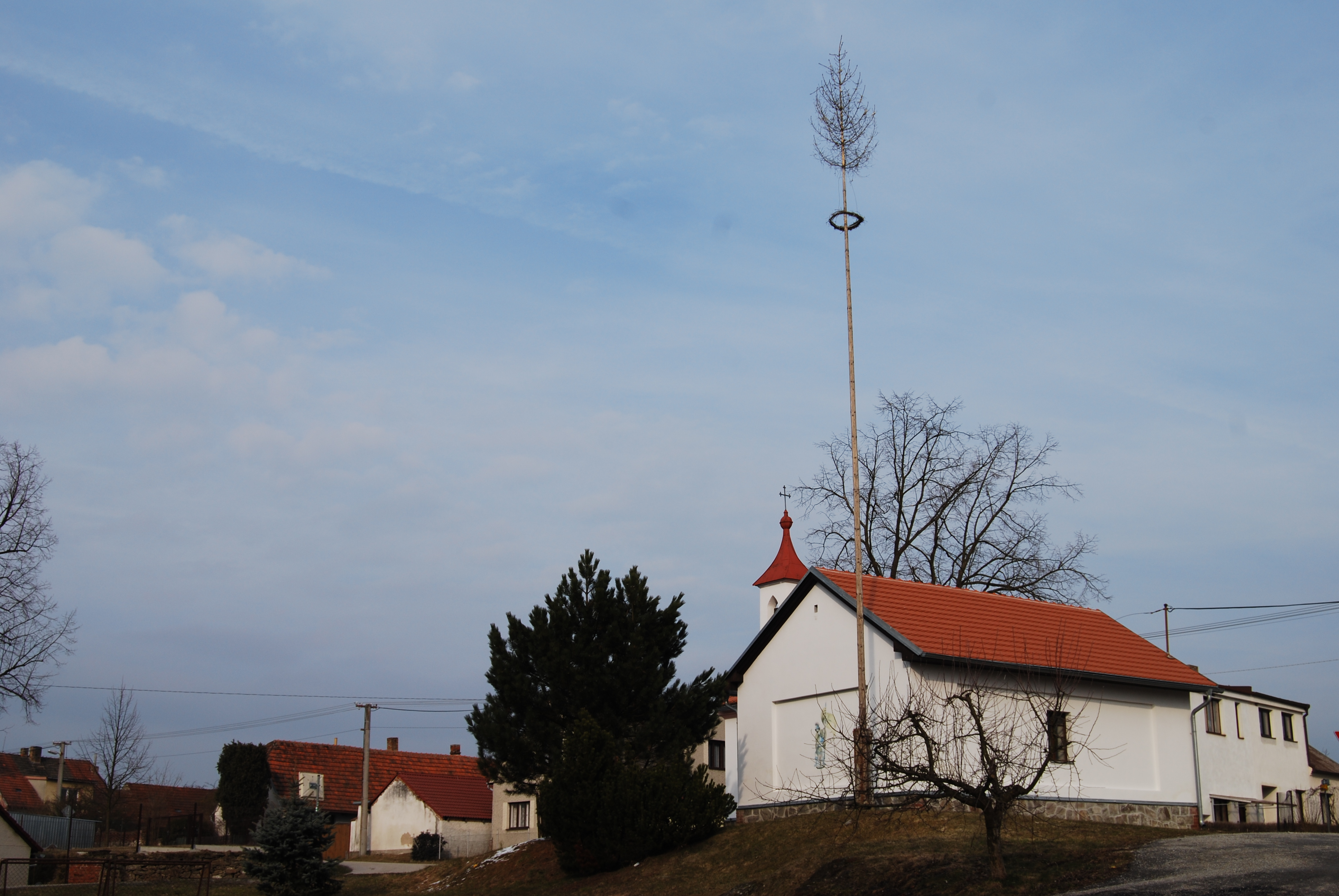 Pohled na náves. Písecká Smoleč je část obce Slabčice v okrese Písek. Česká republika.